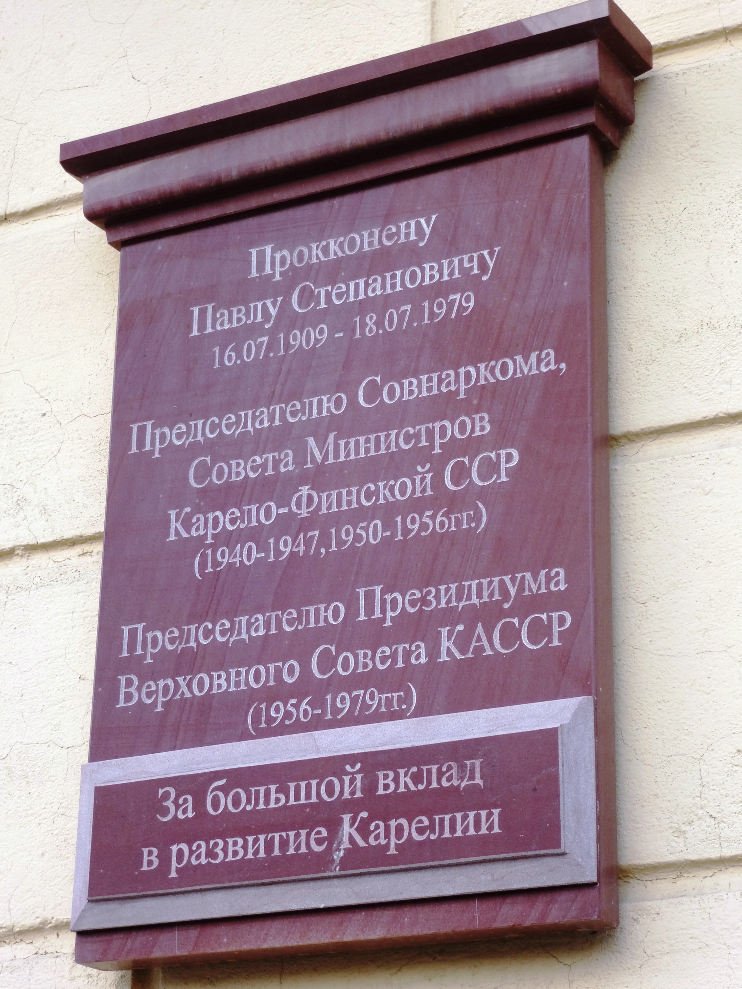 Памятная доска Прокконену Павлу Степановичу в Петрозаводске на здании по ул.Кирова, 24